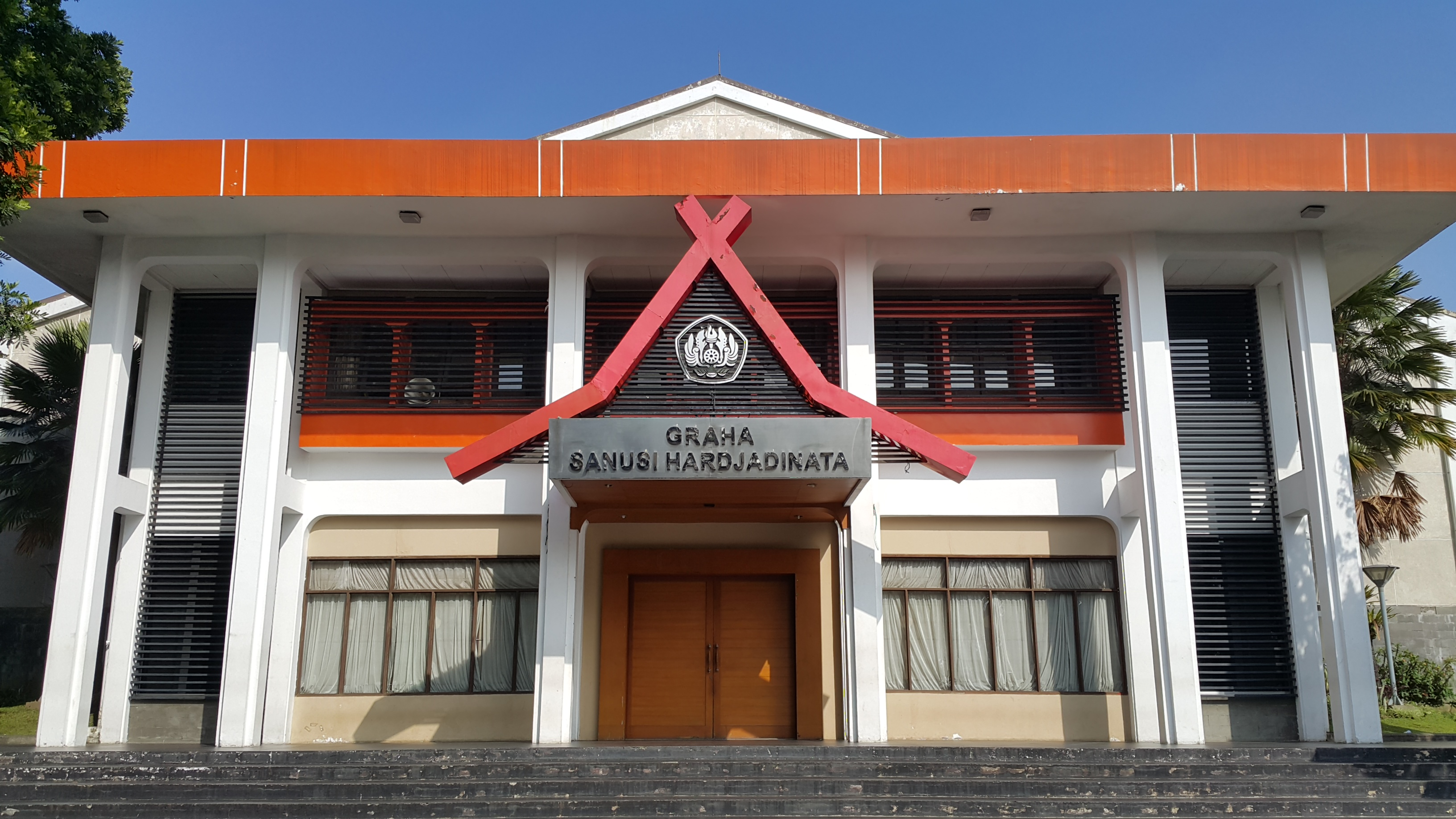 Graha Sanusi Hardjadinata, Kampus Unpad Dipati Ukur